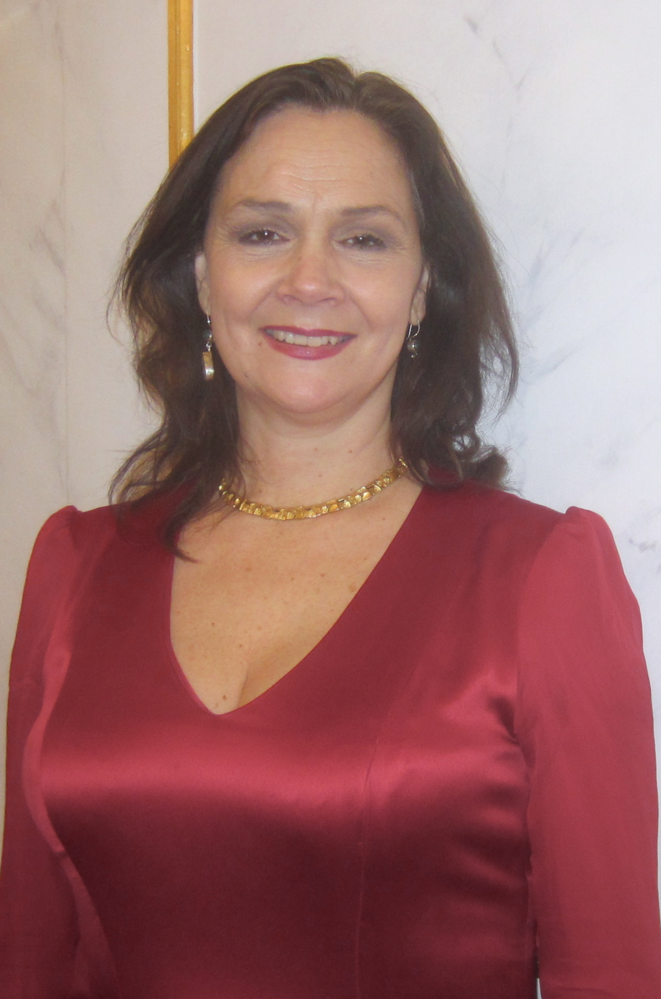 Anna Larsson, född 10 september 1966 i Stockholm, är svensk konsert- och operasångare (alt).